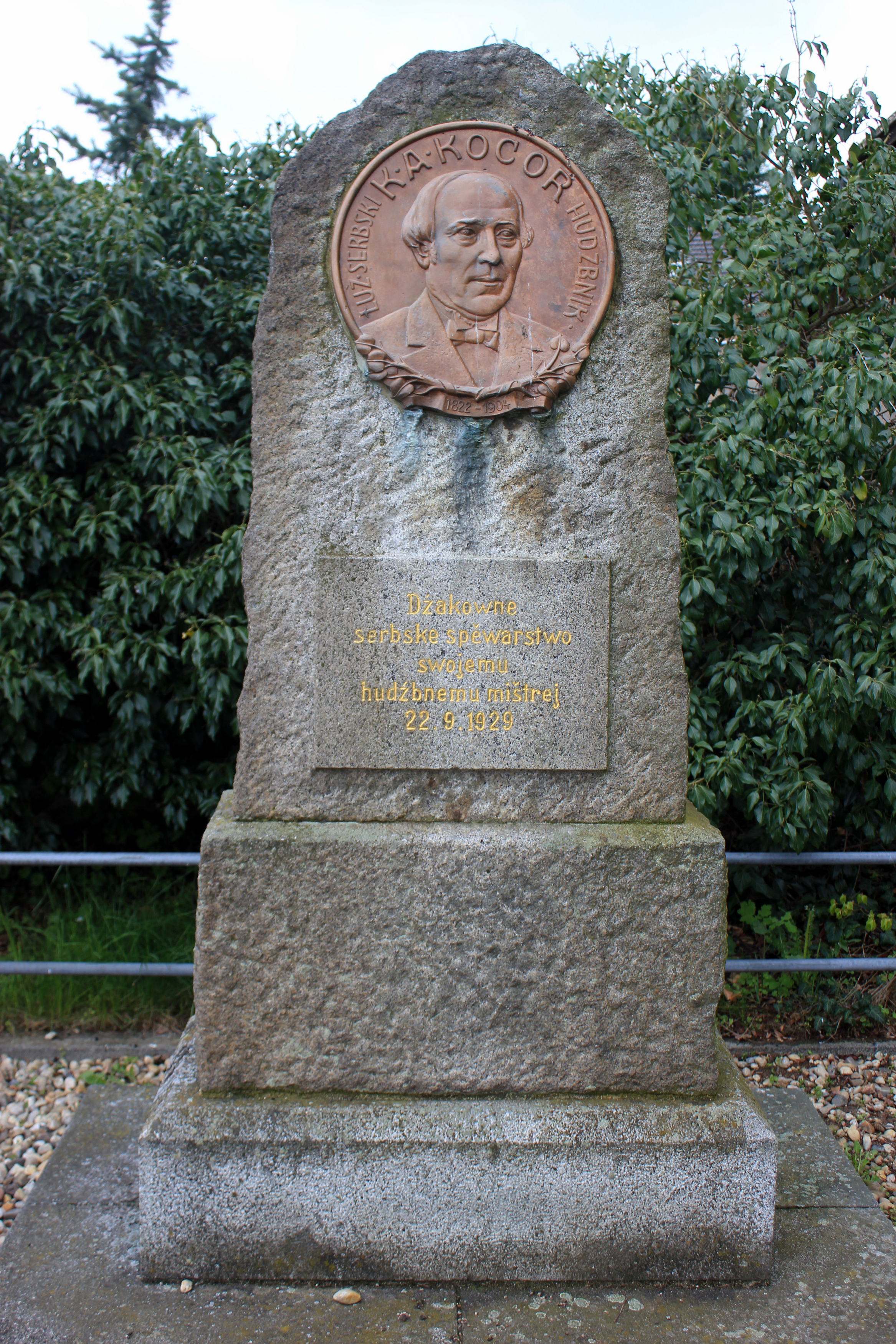 Hornjoserbsce: Pomnik za Korlu Awgusta Kocorja w Zahorju pola Budestec.